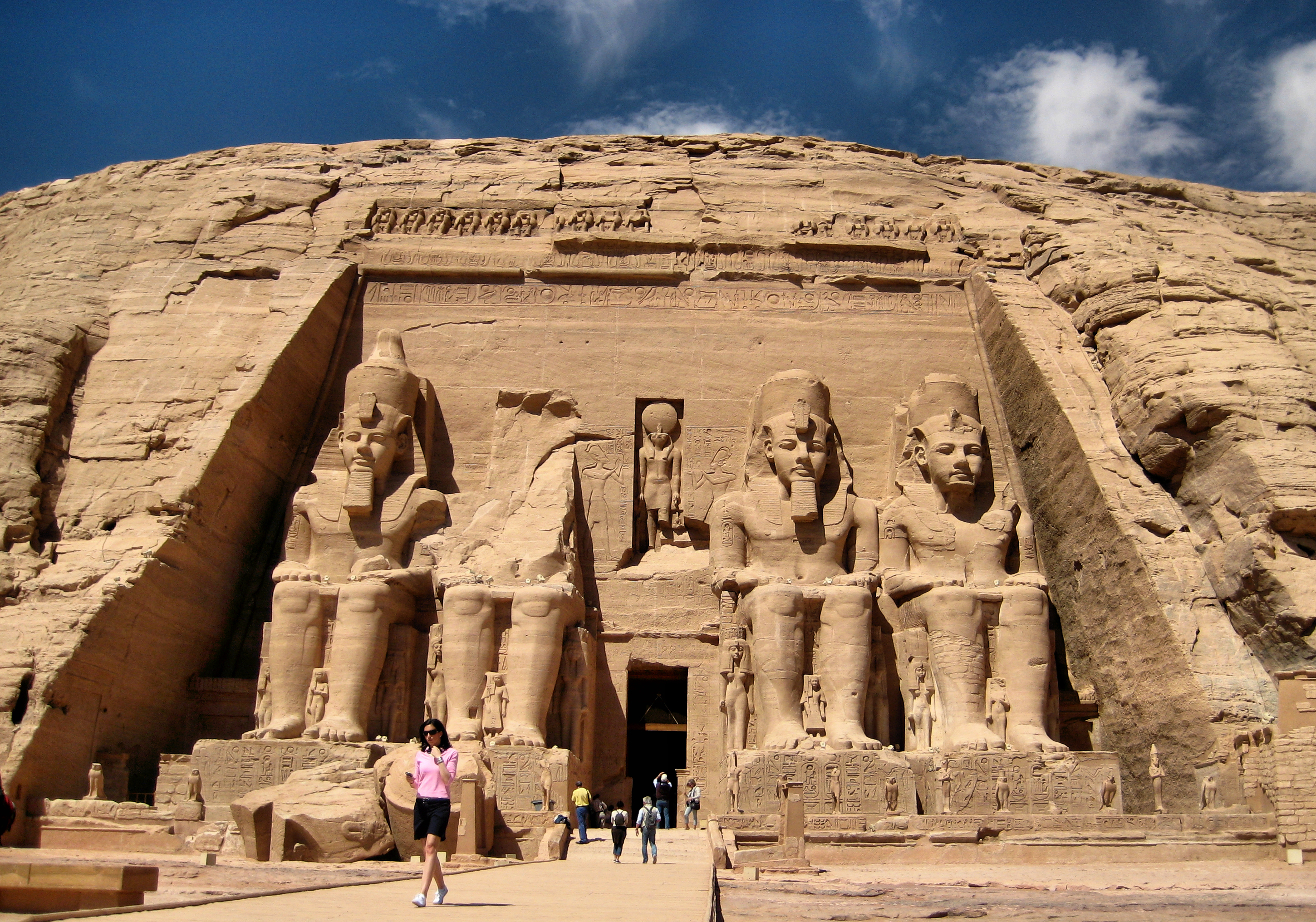 Abu Simbel Main Temple